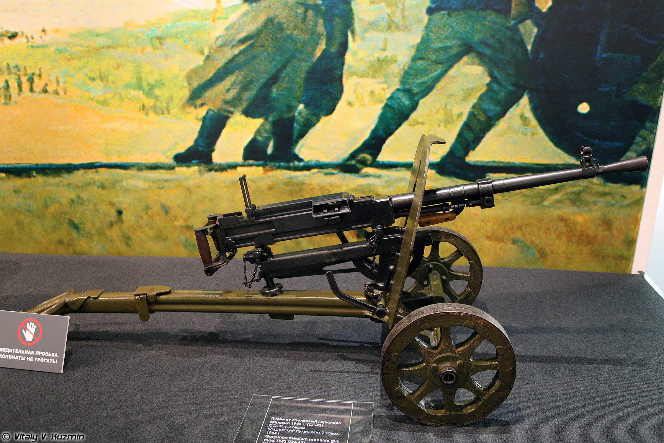 Пулемёт Горюнова СГ-43